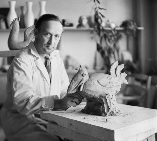 Фотография Михаила Николаевича Шилкина (1900 - 1962)